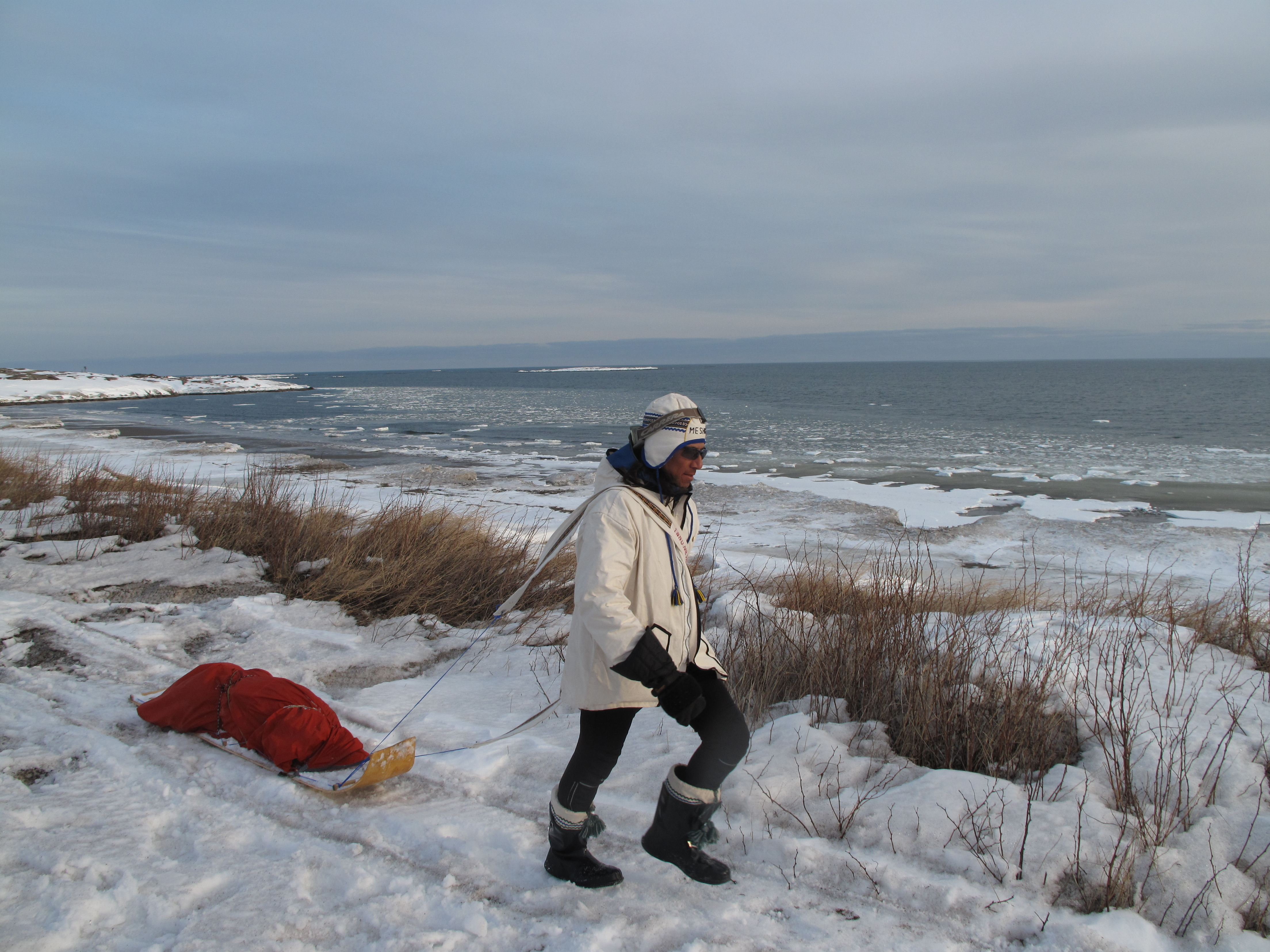 Stanley Vollant dans la région de Natasquan, dans le cadre d'Innu Meshkenu